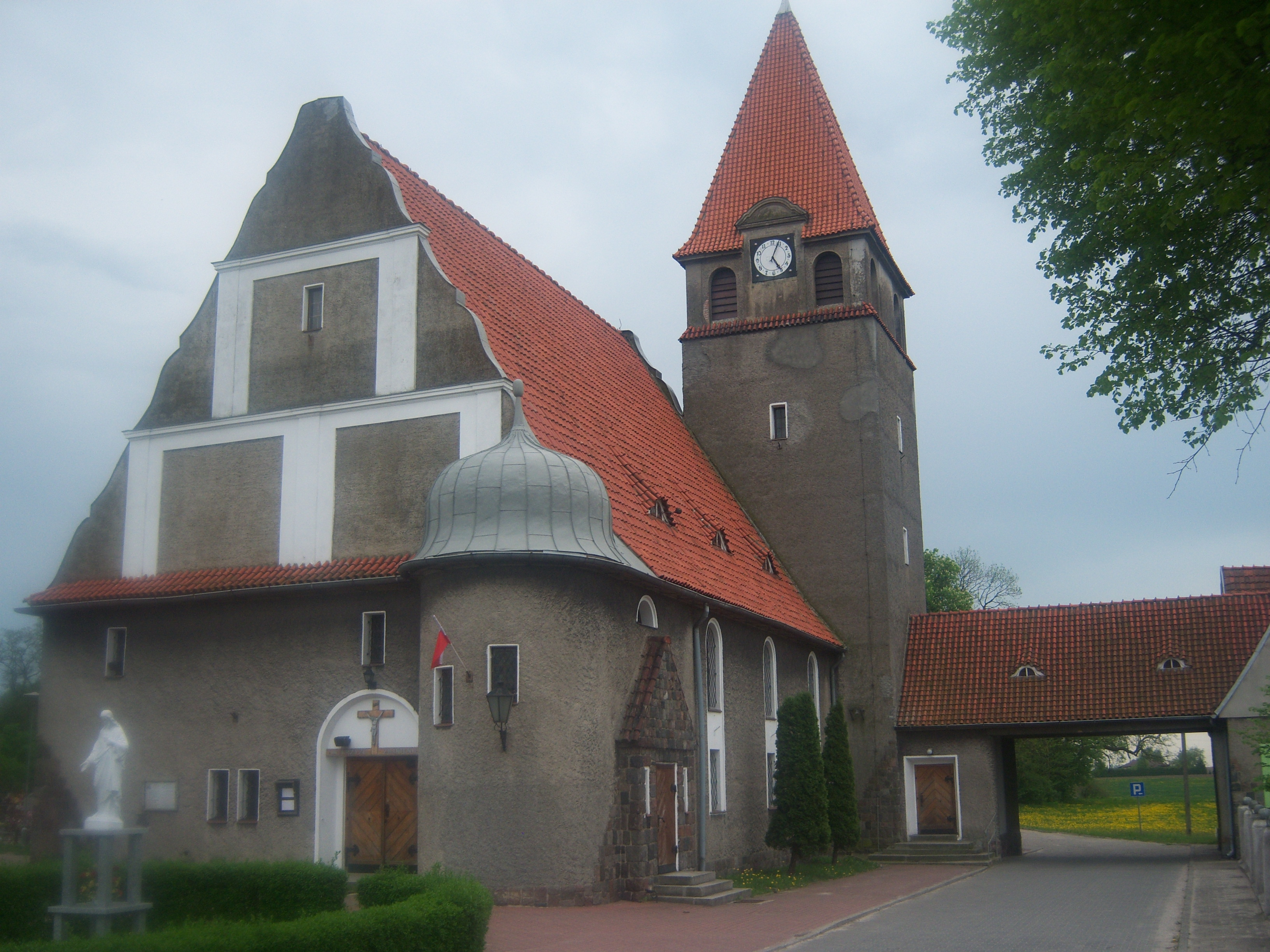 Widok na świątynię w Węgierkach